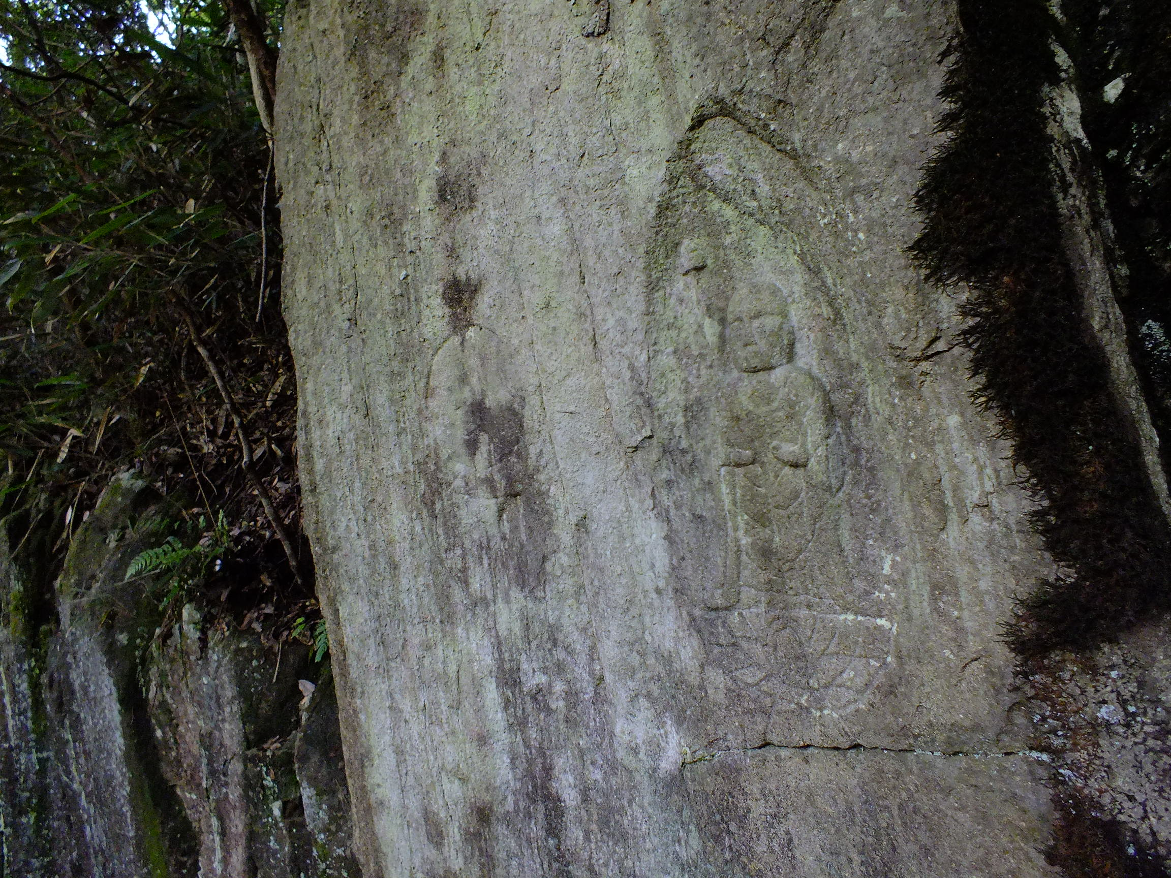 2015-09-14 Seto-Jizo Konda-cho,Sasayama,Hyogo,Japan 瀬戸地蔵